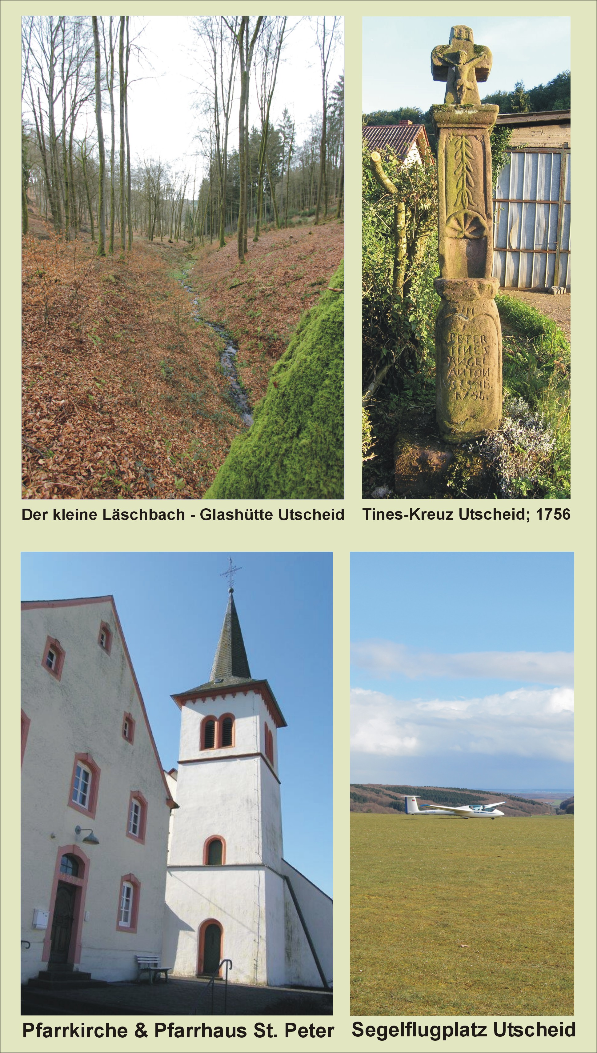 54675 Utscheid in der Eifel. Sehenswürdigkeiten in der Ortsgemeinde Utscheid.